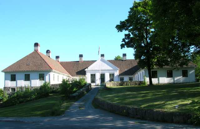 Laurvig Hospital i Larvik